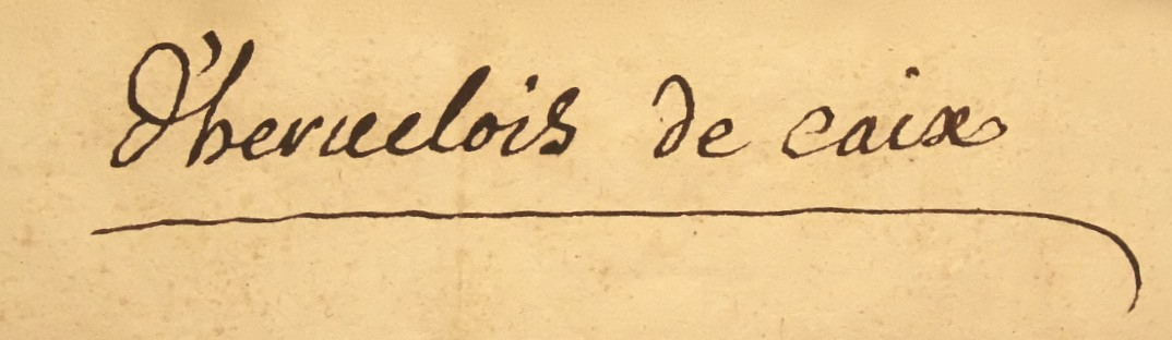 Signature du compositeur et violiste Louis d'Hervelois de Caix sur son testament olographe du 18 octobre 1759 déposé chez son notaire Jean-François Jourdain (Paris, archives nationales, minutier central des notaires parisiens, et. CXII, 574A).